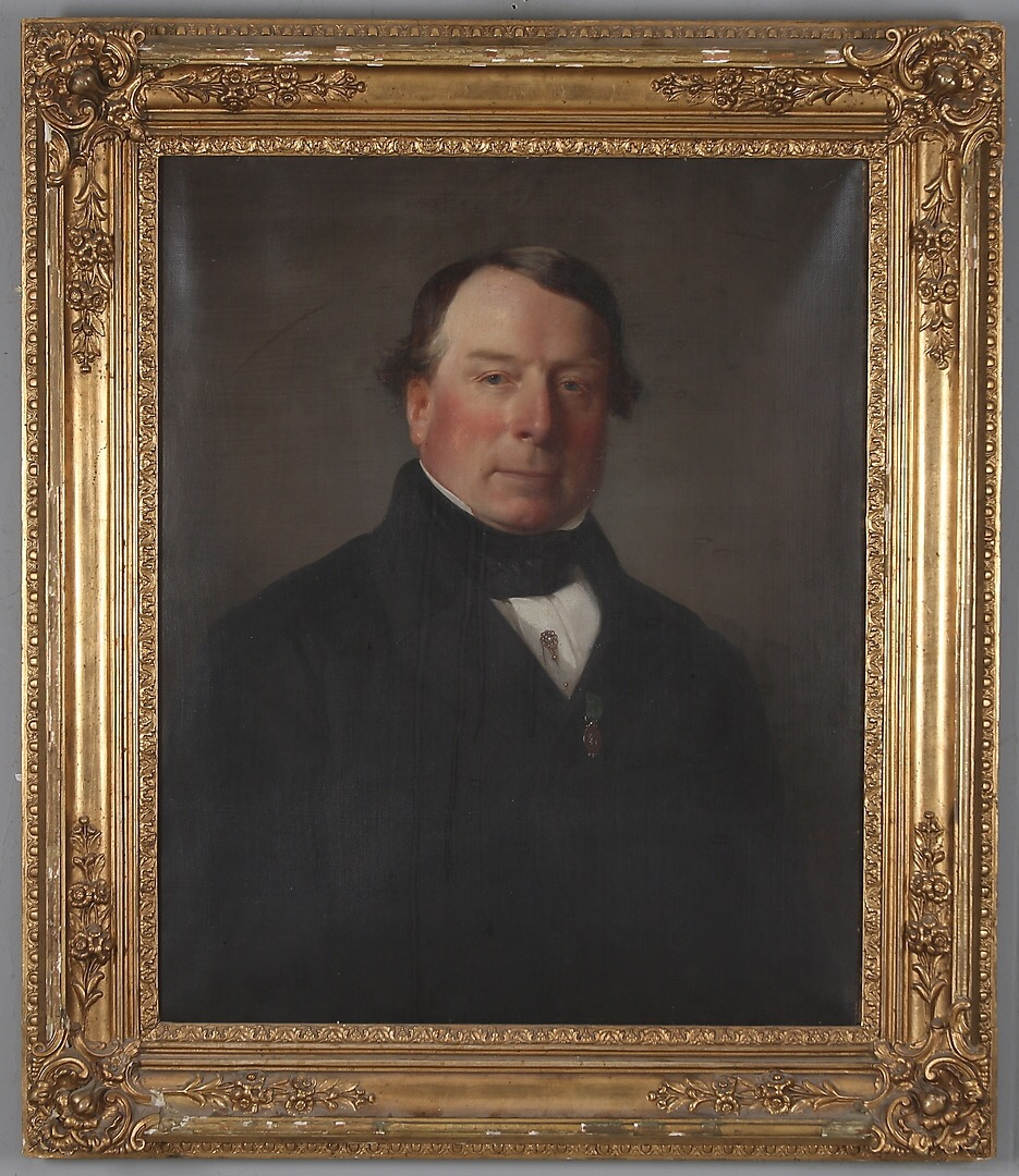 Lars Johan Warodell avporträtterad 1857 av Carl Staaff. På bröstet syns Vasaordens ordenstecken i miniatyr.